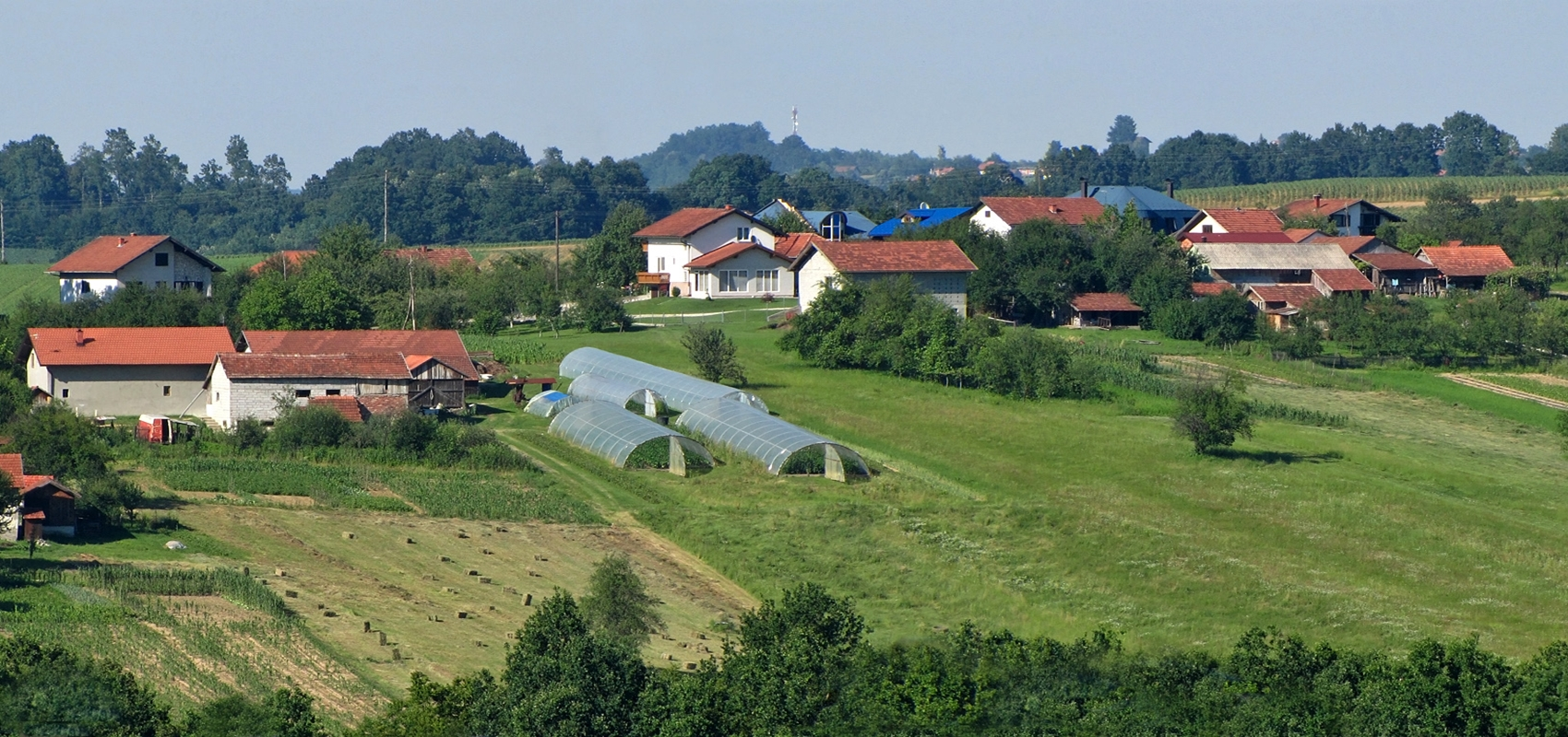 Горњи Штрпци (Прњавор)